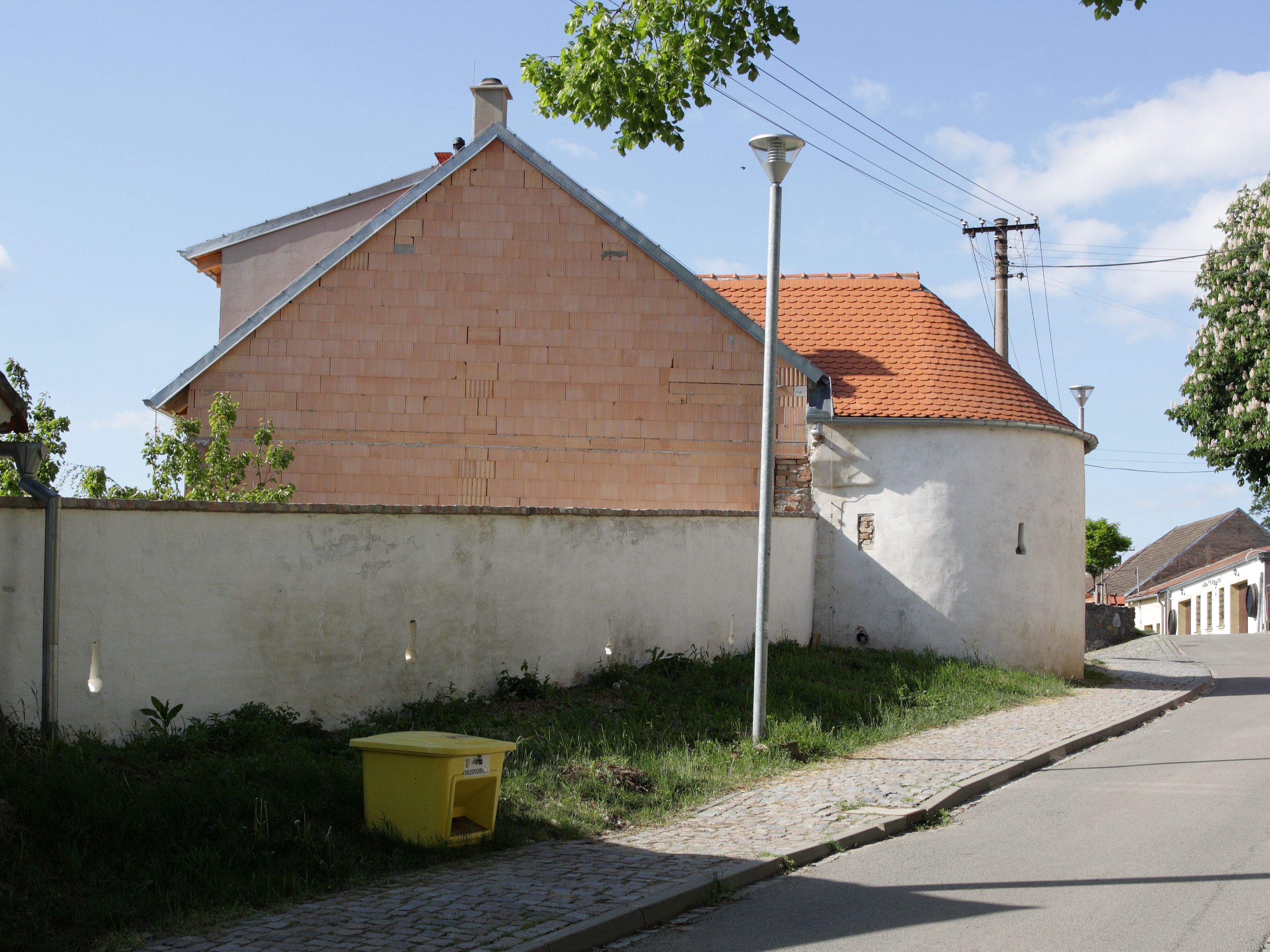 Hustopeče - bašta s úsekem hradební zdi, ulice Na Hradbách.